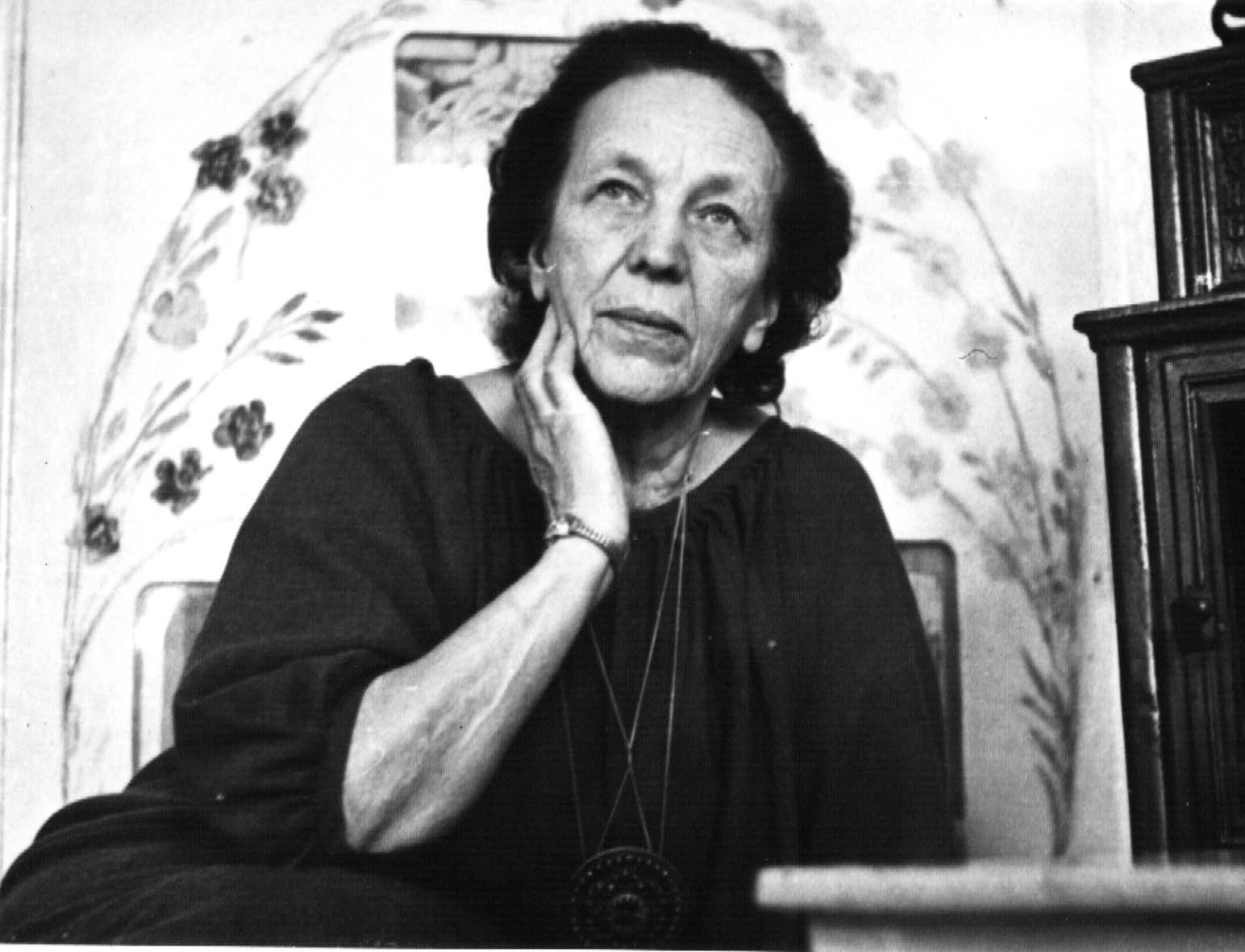 Norwegian author Ingeborg Refling Hagen (1895-1989)